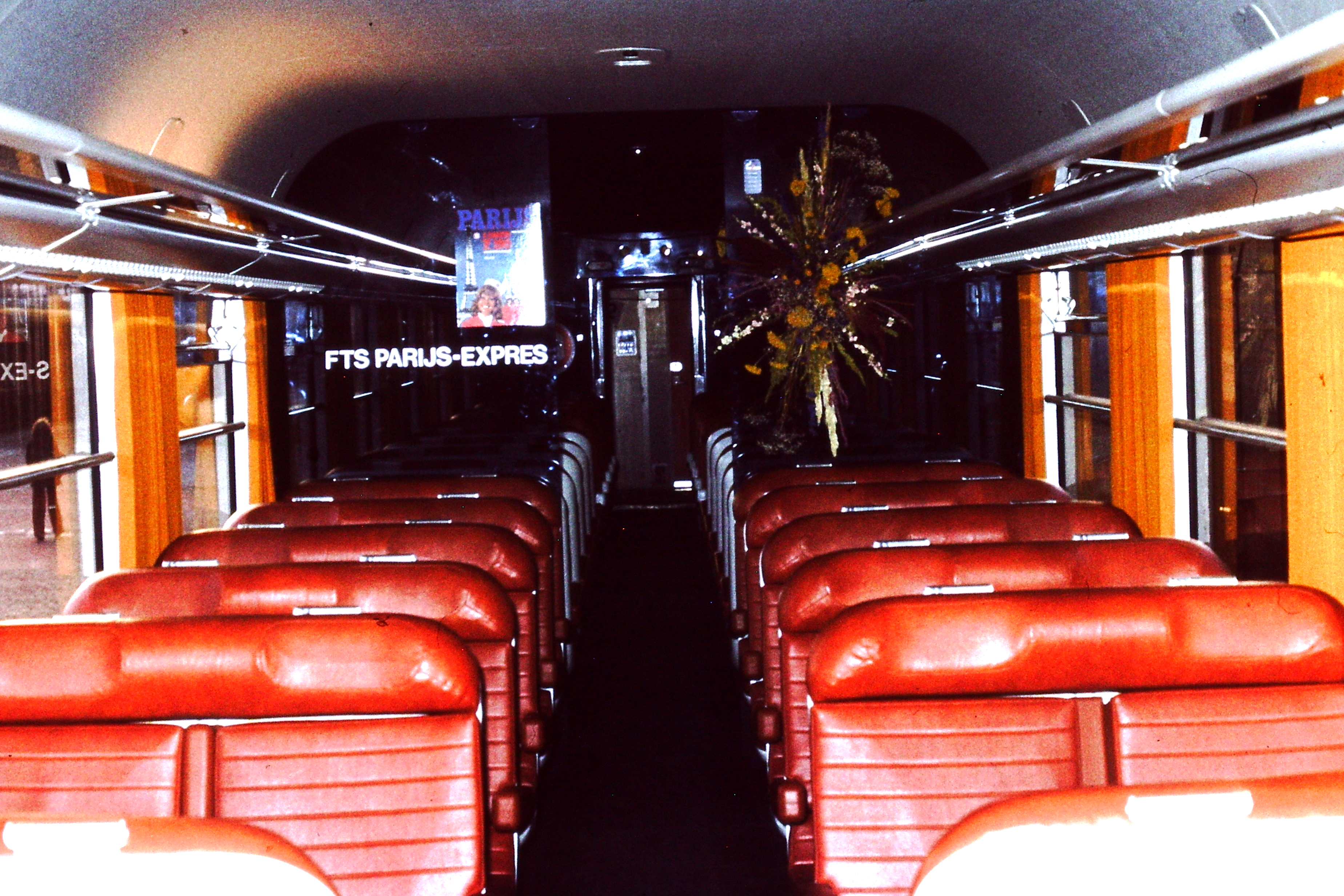 Interieur van een Corail rijtuig in tweede klasse.